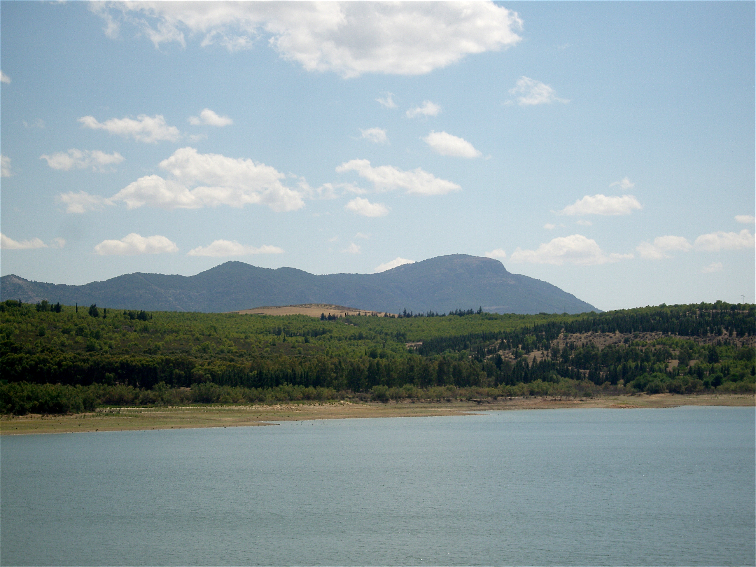 Vue du versant septentrional Djebel Ballouta depuis le barrage de Lakhmess